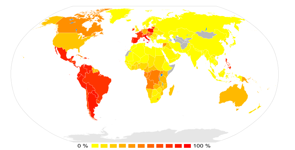 Mapamundi mostrando el porcentaje de católicos por país en una gama cromática de amarillo a rojo.